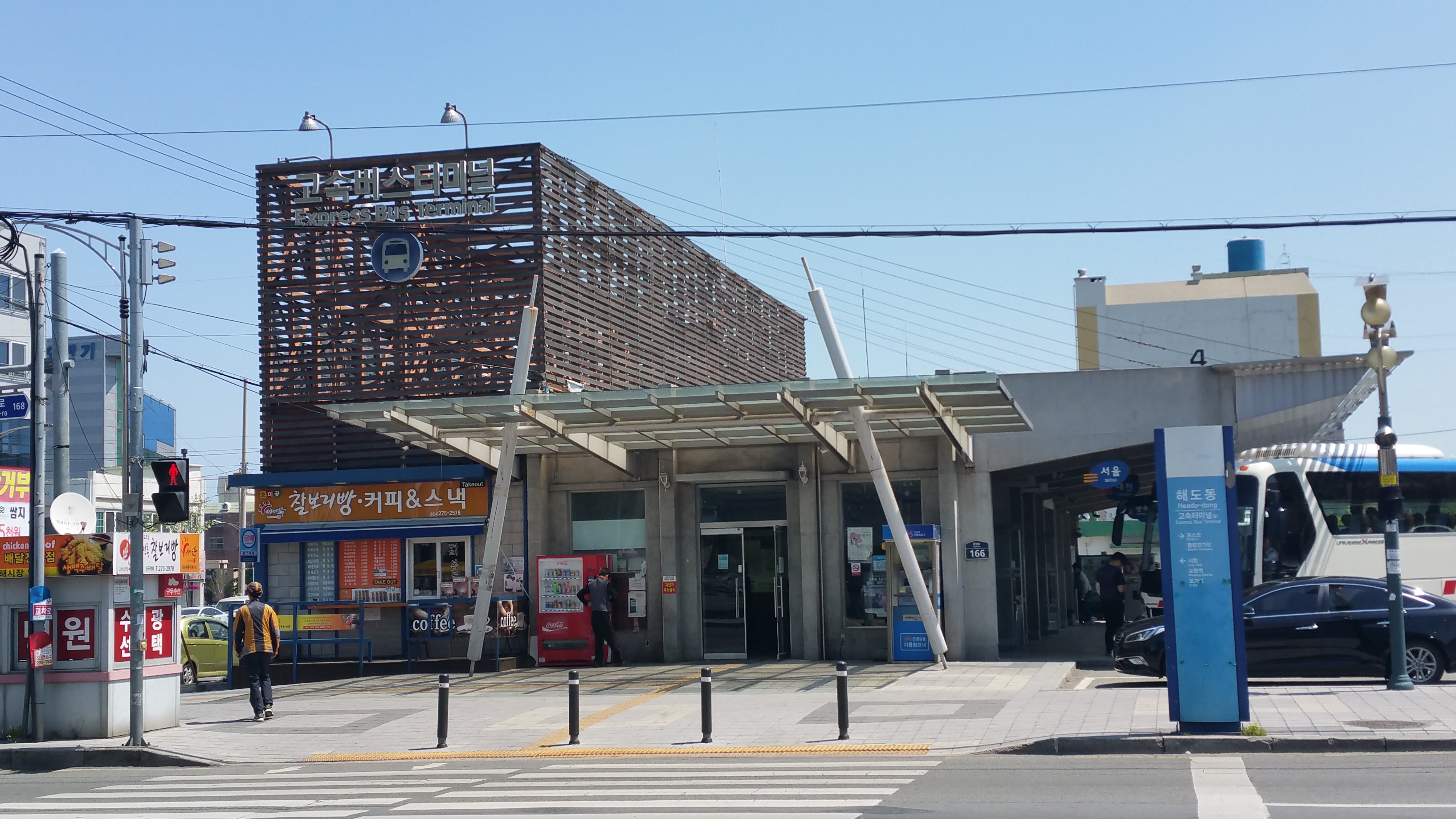 2017년 4월 29일에 촬영된 포항고속버스터미널